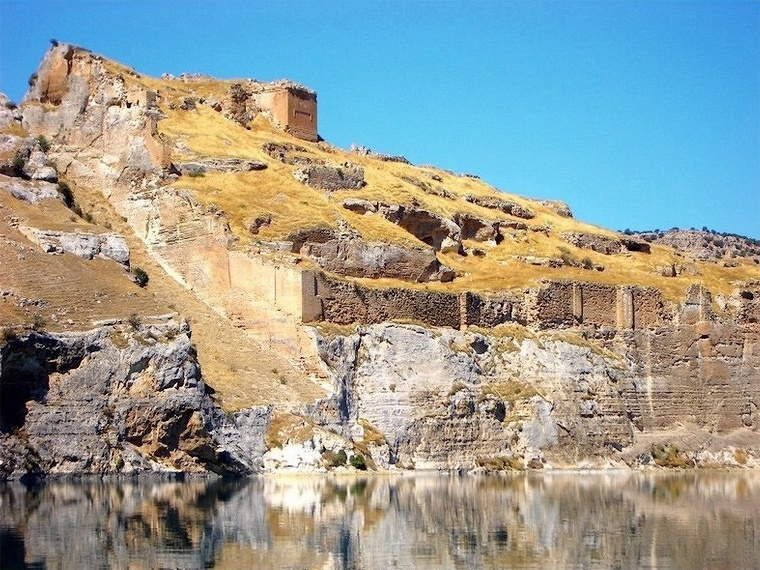 Rumake in Halfeti, Şanlıurfa (Turkey)